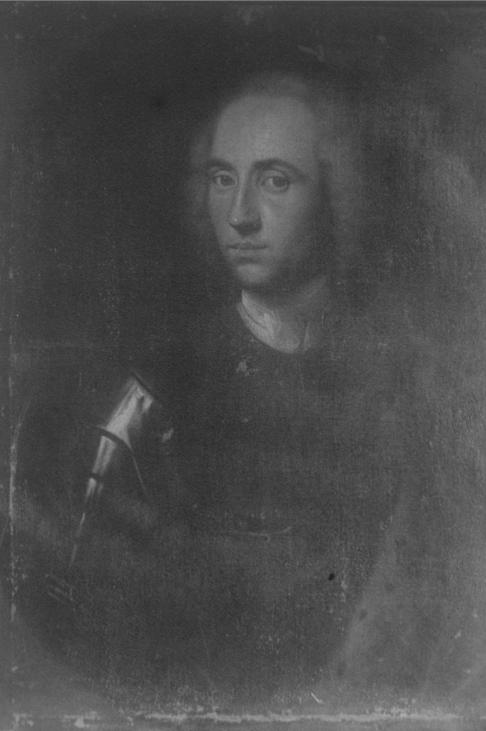 Gregorius (I) Ziegler († e. 1648) – leiesoldat og offiser i dansk-norsk tjeneste som kommandant på Halmstad slott og senere major ved Tønsbergske regiment under Hannibalfeiden.